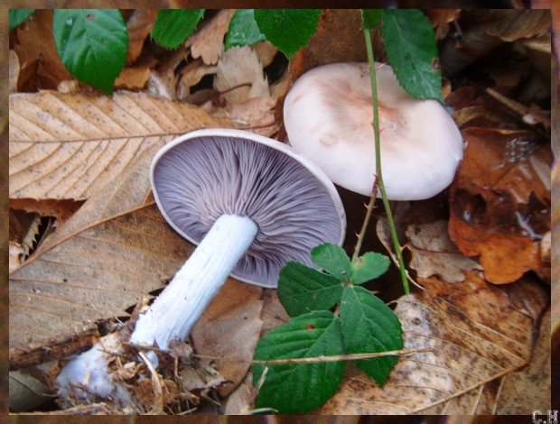 Champignon Lépiste Sordide de la Famille des Tricholomatacées